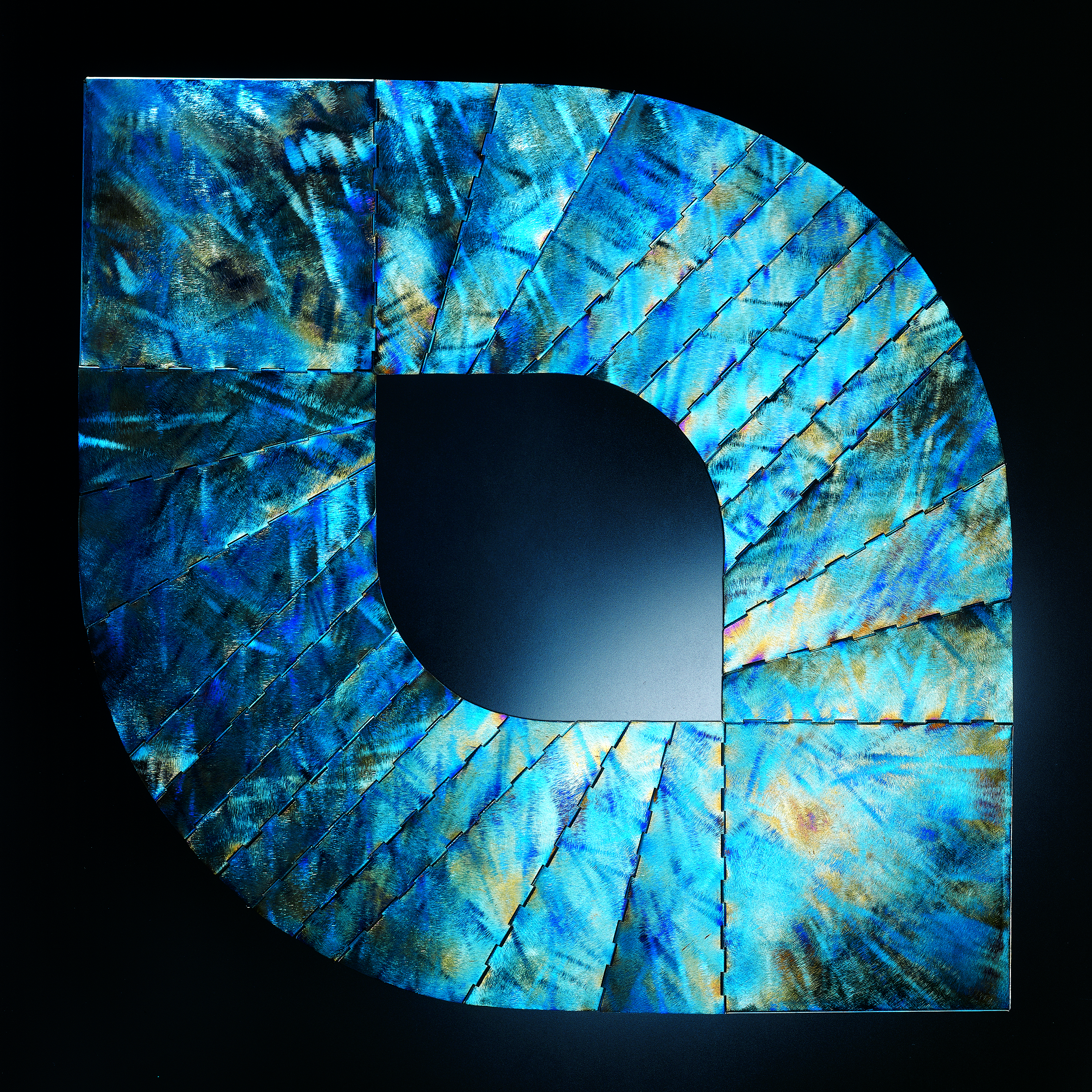 Grande parure en titane, 1994 - Thierry Bontridder, sculpteur et créateur de bijoux contemporains.